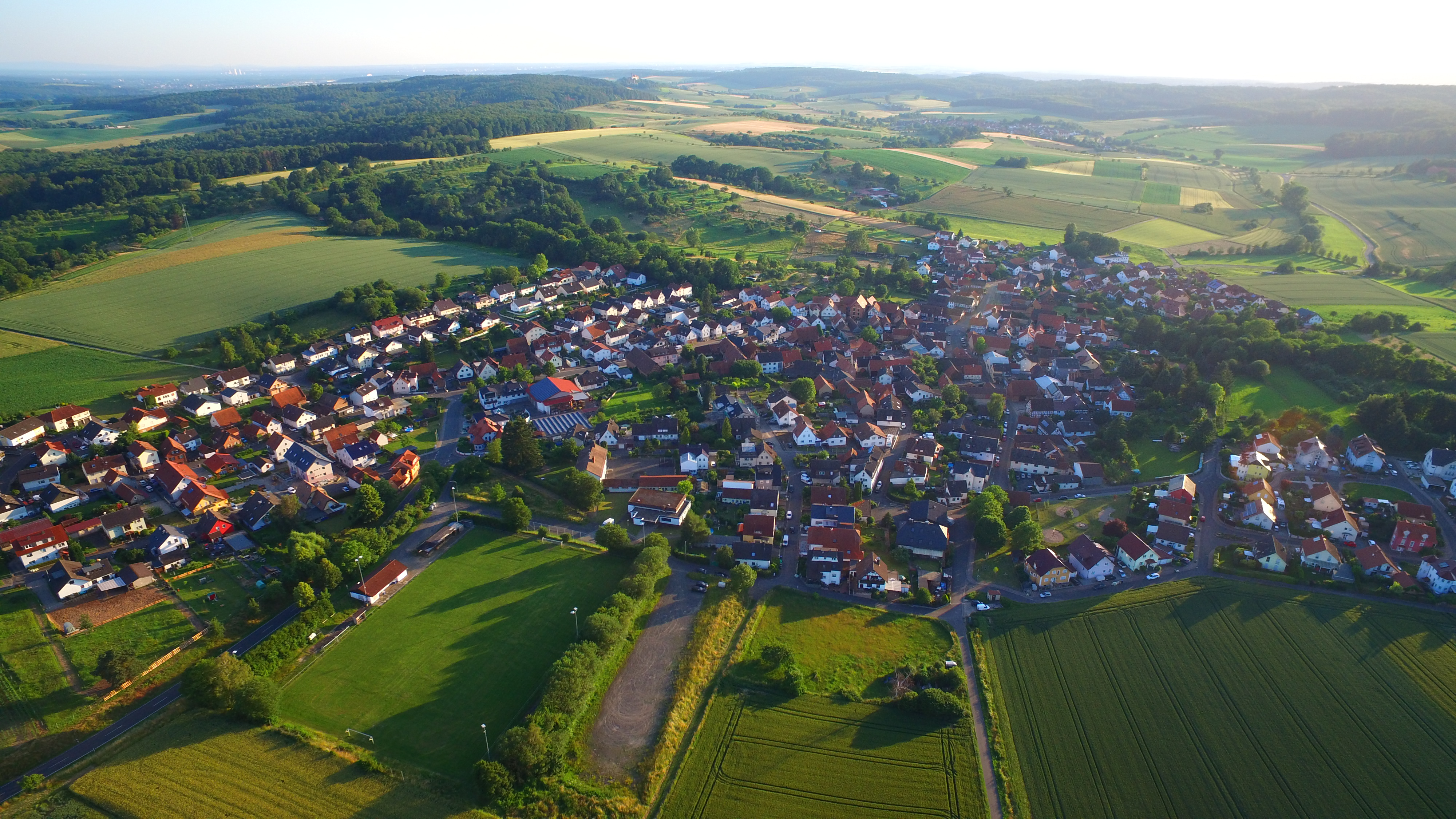 Vonhausen aus Vogelperspektive